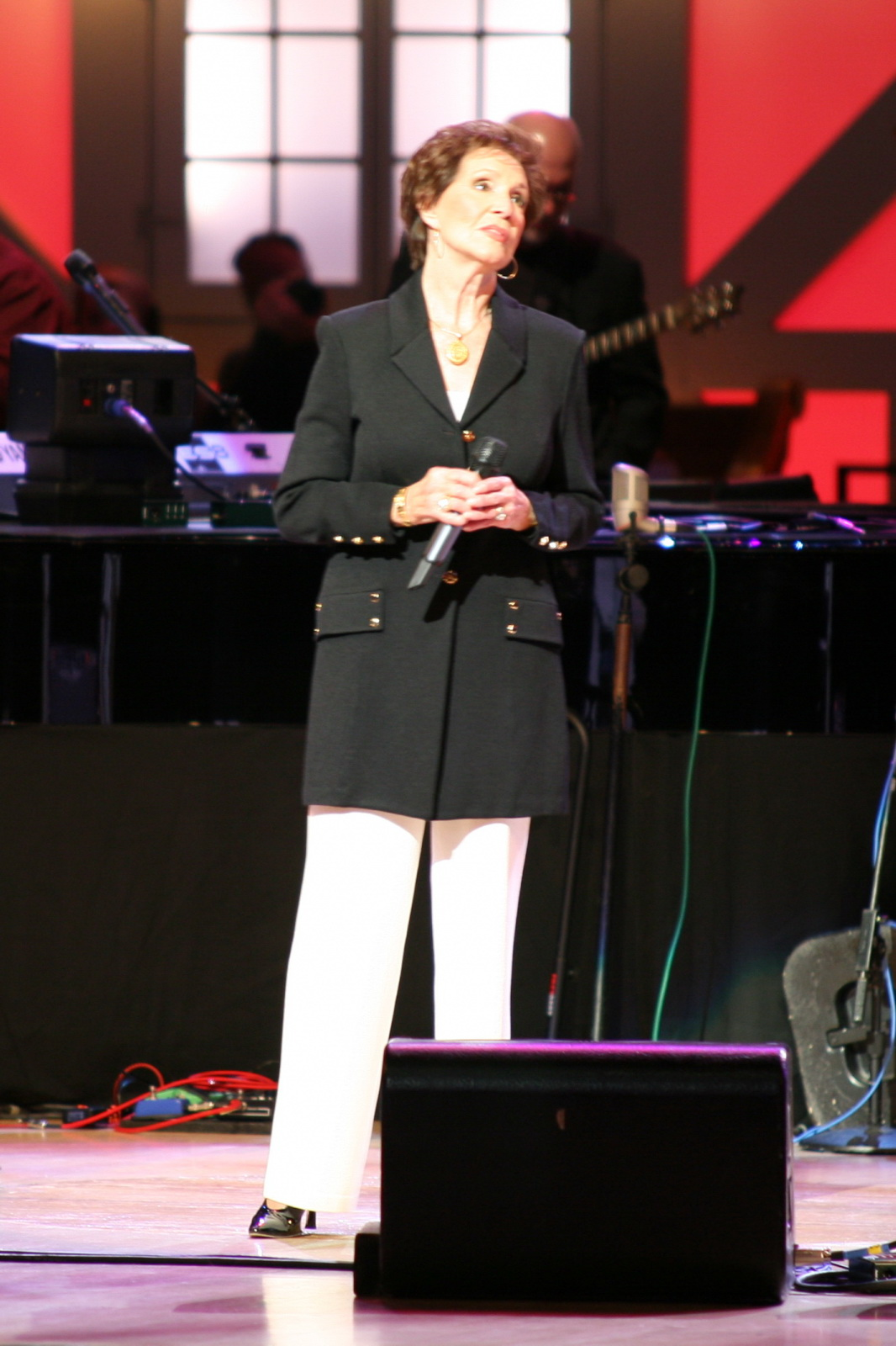 Jan Howard